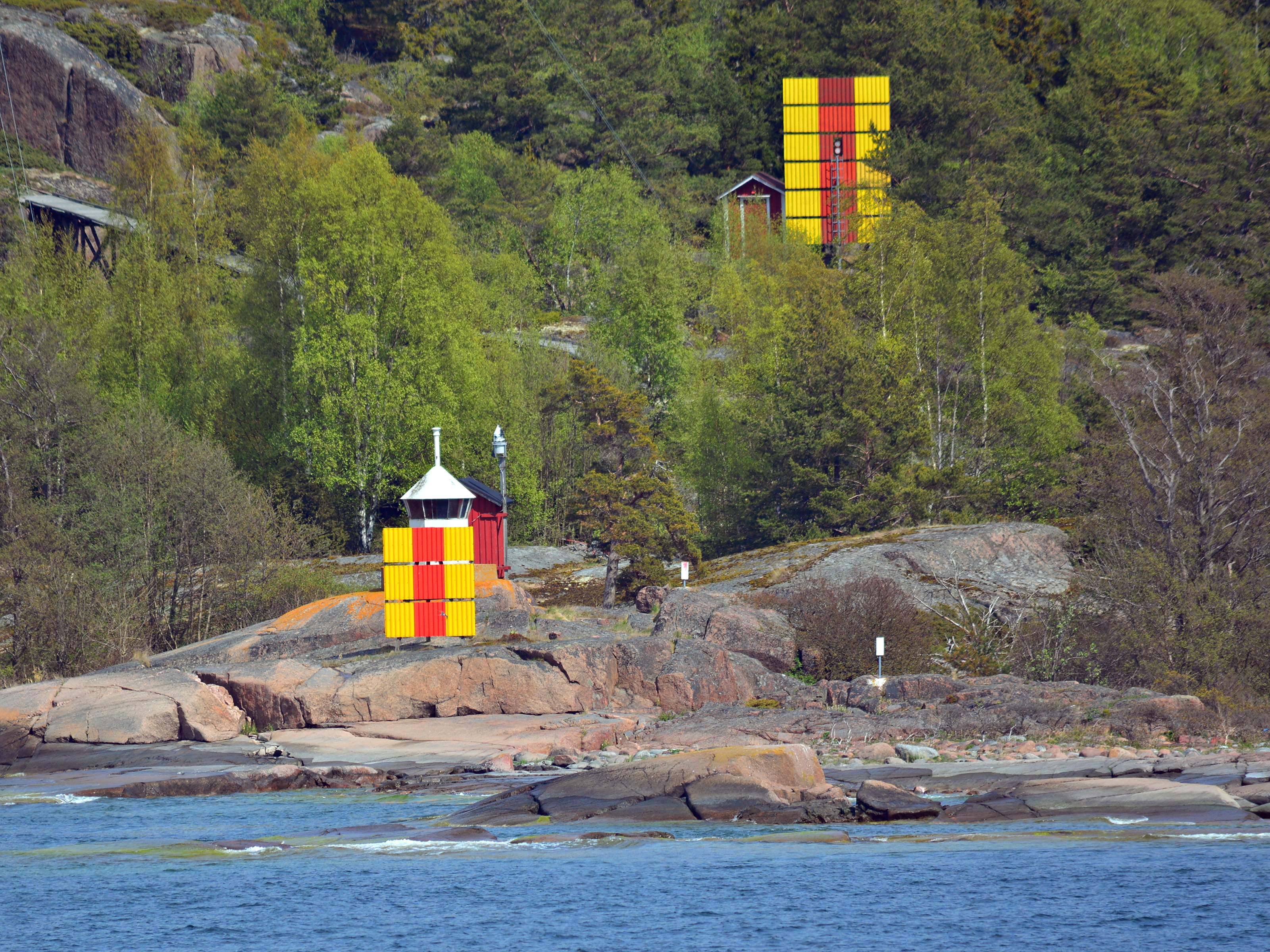 Ensfyrarna på Yttre Korsö utanför Mariehamn, Åland.